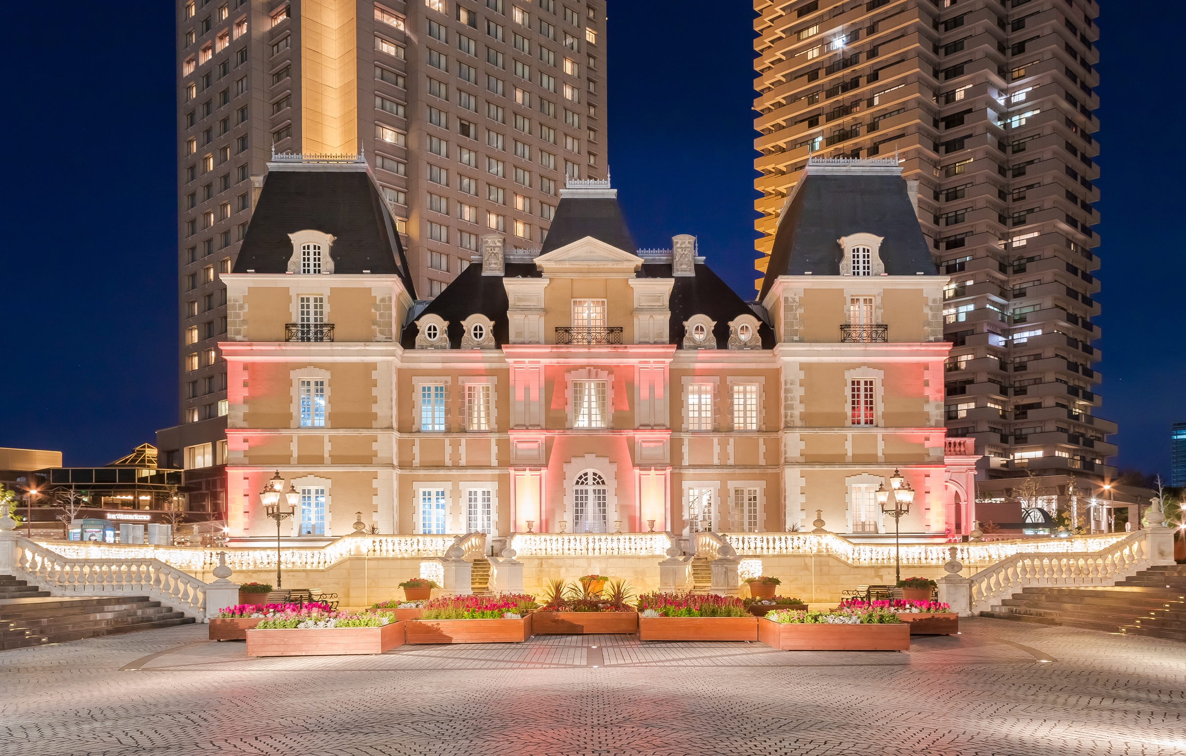 ジョエル・ロブションサロン（東京・恵比寿ガーデンプレイス）